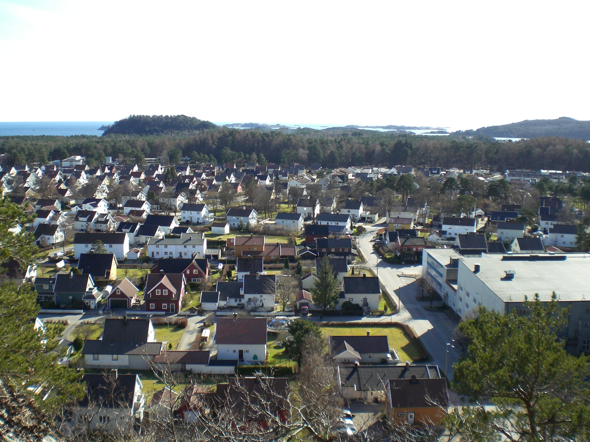 Vestnes sett fra Buråstoppen i Mandal i 2009. Utsyn sørover, med Furulunden i bakgrunnen, og skjærgården bak dette igjen.